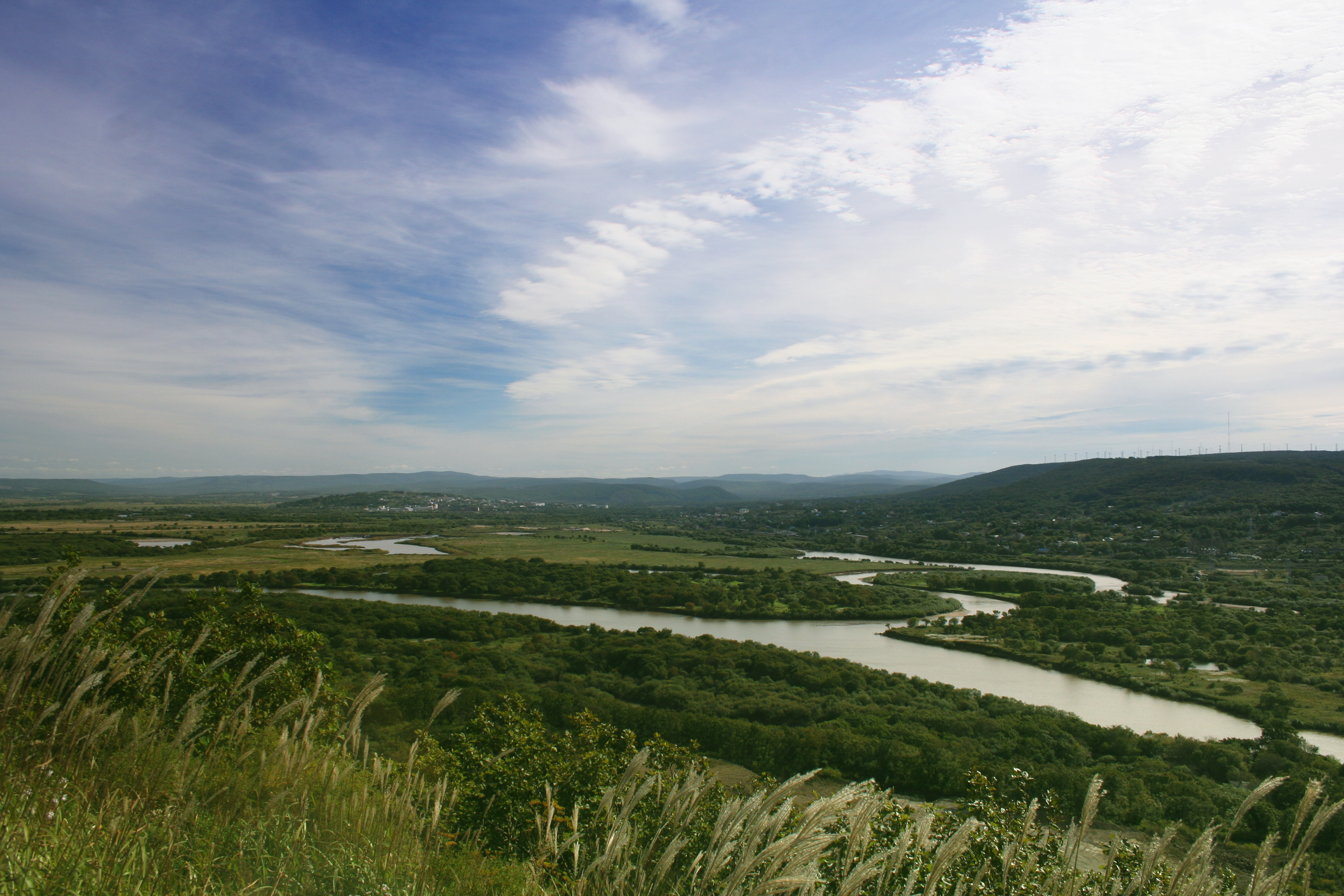 Лиман реки Раздольная, Надеждинский район This image is related to the protected area of Russia number 2510154